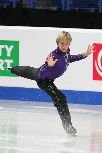 Евгений Плющенко на чемпионате Европы по фигурному катанию 2012